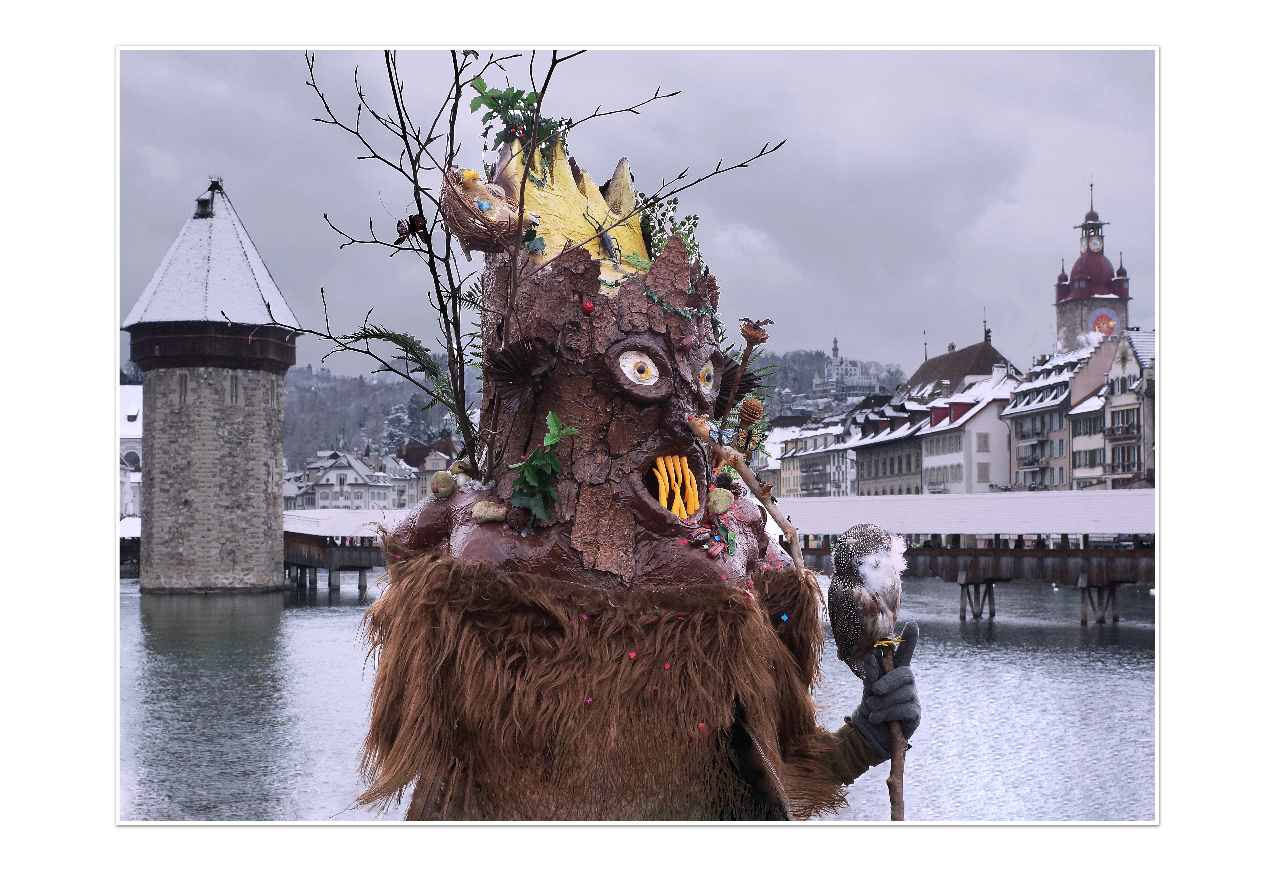 Personnage de carnaval